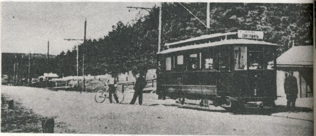 Святошинський трамвай: Вагон на лінії Святошинського трамвая